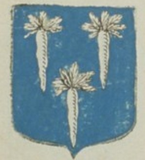 Armes famille Cazotte enregistrées en 1696 à l'Armorial Général de France